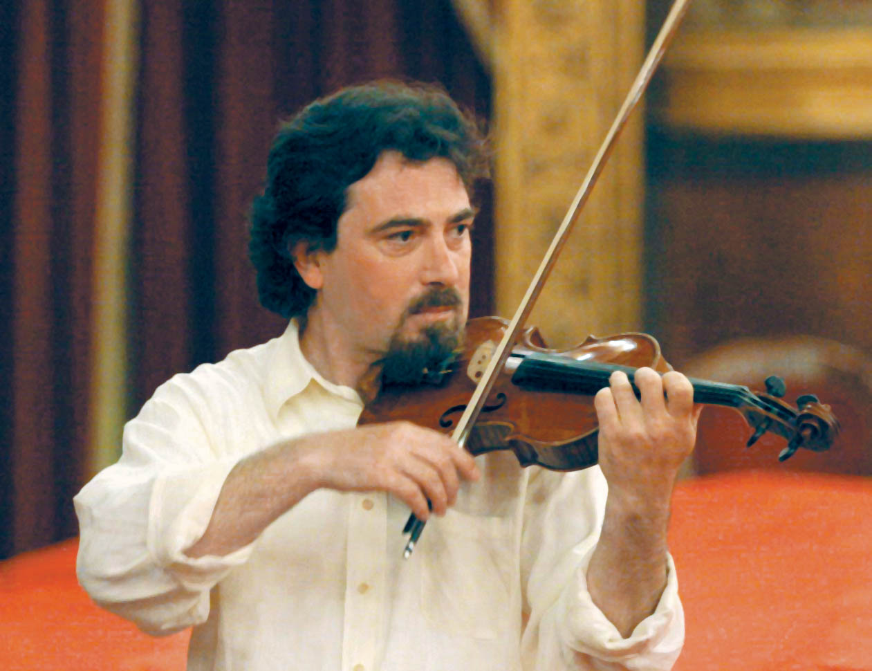 Maestro Salvatore Greco, violinist, Teatro Massimo, Palermo, 2005